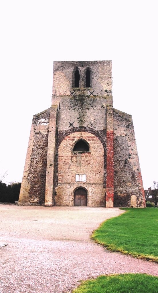 Toren van de Abdijkerk te Sint-Winoksbergen